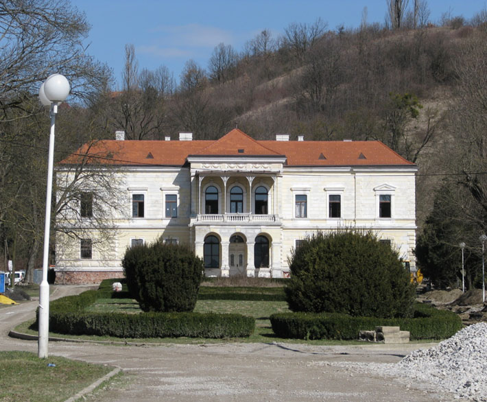 Dvorac Laduč, općina Brdovec